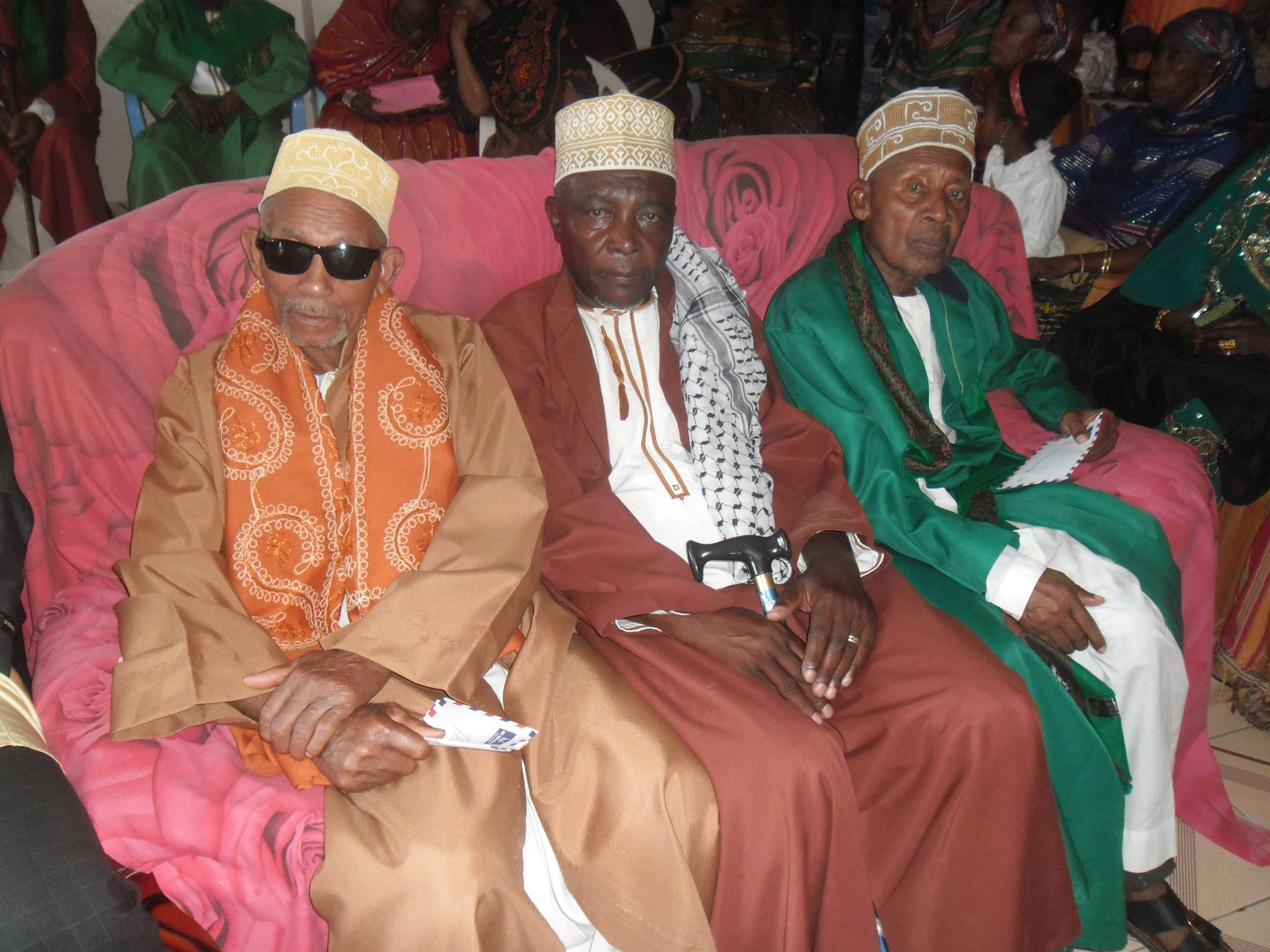 Habits traditionnels à porter quand on a déjà fait le grand mariage à Ngazidja (grande Comore)